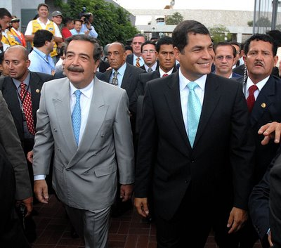 Presidente de Ecuador Rafael Correa junto con el Alcalde de Guayaquil Jaime Nebot.